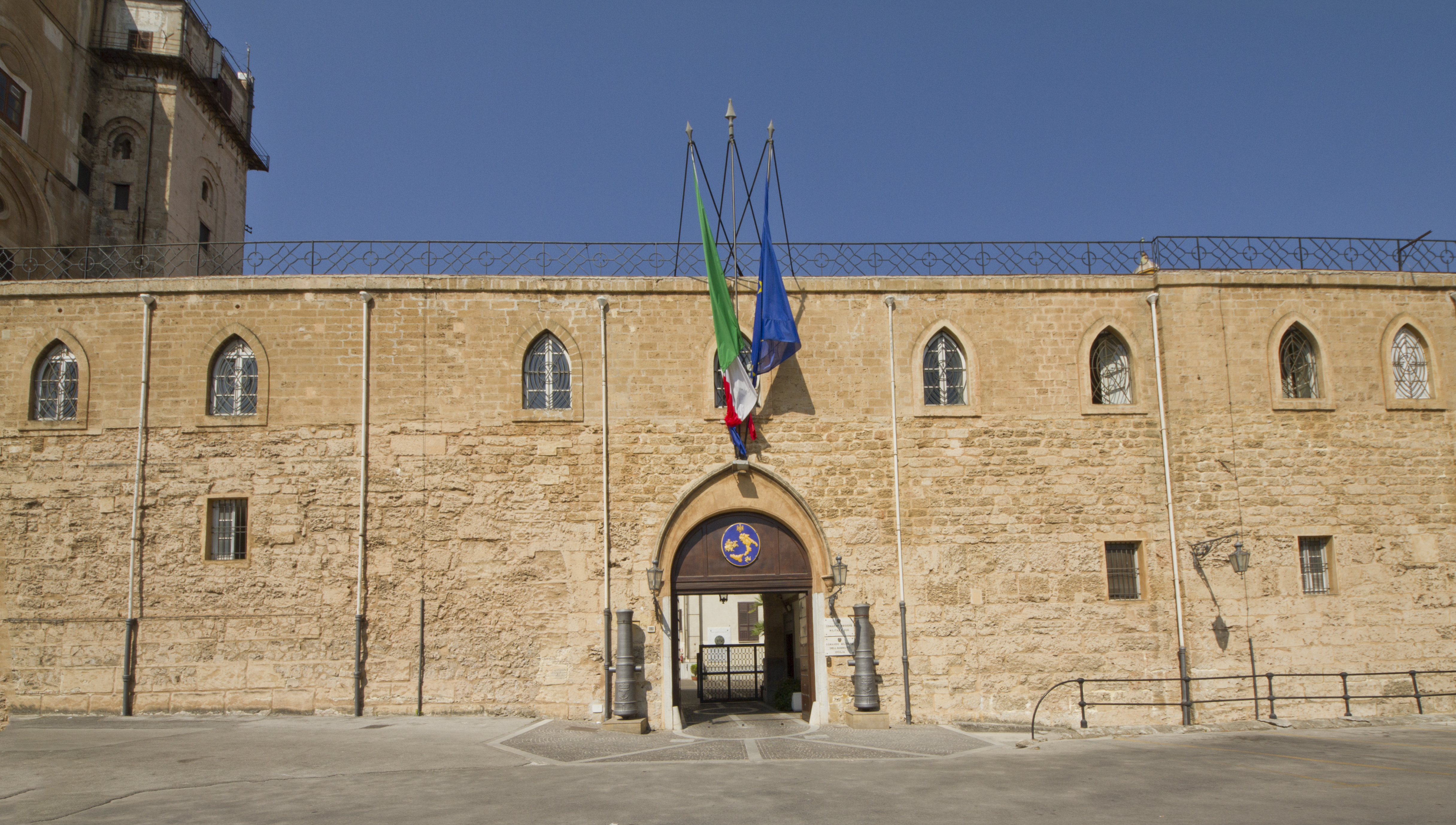 Comando militare regione Sicilia, Albergaria, Palermo, Sicily, Italy